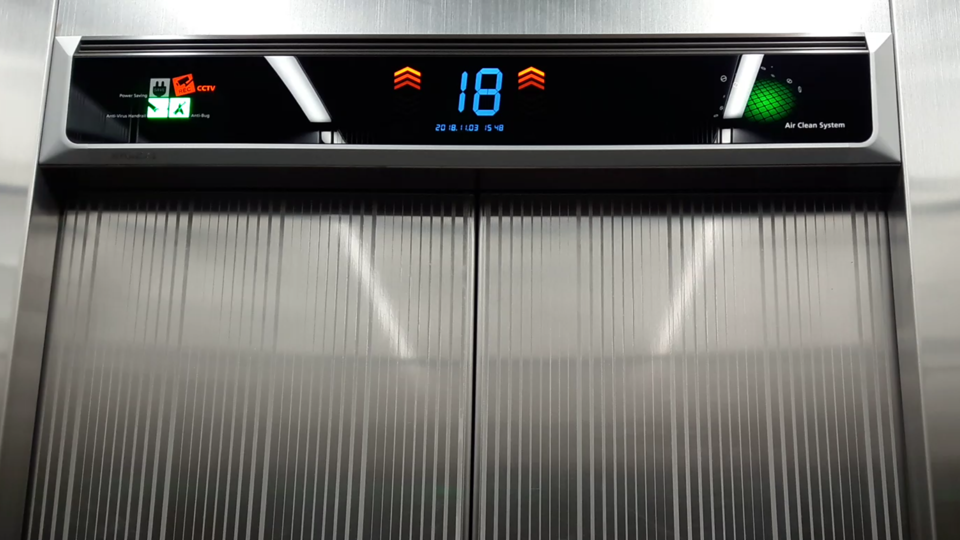 현대엘리베이터 스마트 인디케이터 (2018년 10월 25일 설치)